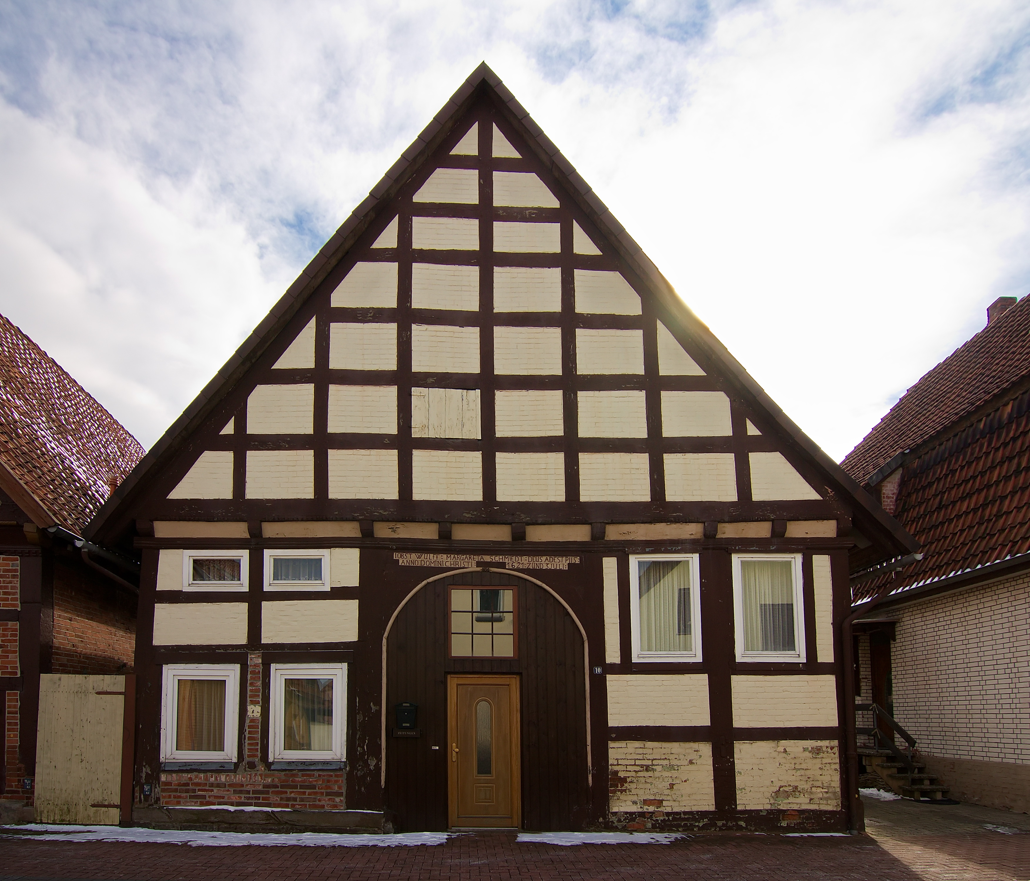 Sachsenhagen ist eine Stadt im Landkreis Schaumburg in Niedersachsen und als Gemeinde Teil der Samtgemeinde Sachsenhagen.